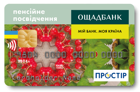 карта простір